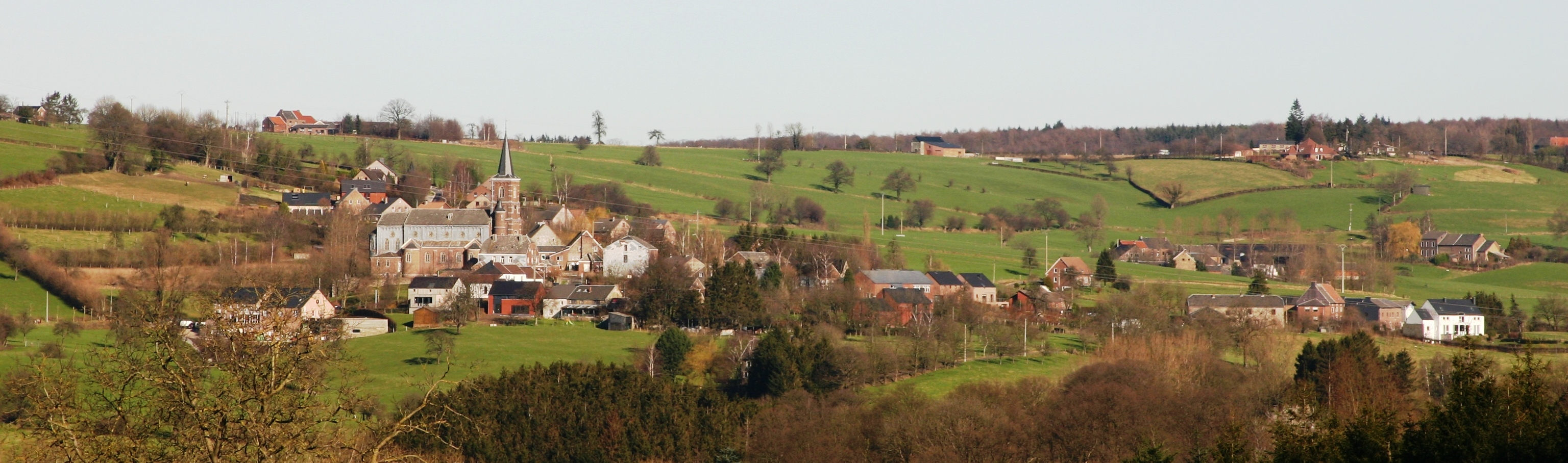 Saint-Jean Sart vu Charneux aus gesinn.